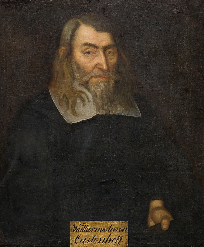 Porträtt. I olja . Källarmästaren Casten Hoff (död 1668), måladt af okänd. Har fordom hängt på gamla källaren 'Kastenhof' numera hotell Rydberg. Finnes afbildad i Bellmans skrifter, utgifn. af G. Carlén. Märkt Källarmestaren Castenhoff.' I enkel förgylld listram med rokokoornament i hörnen.